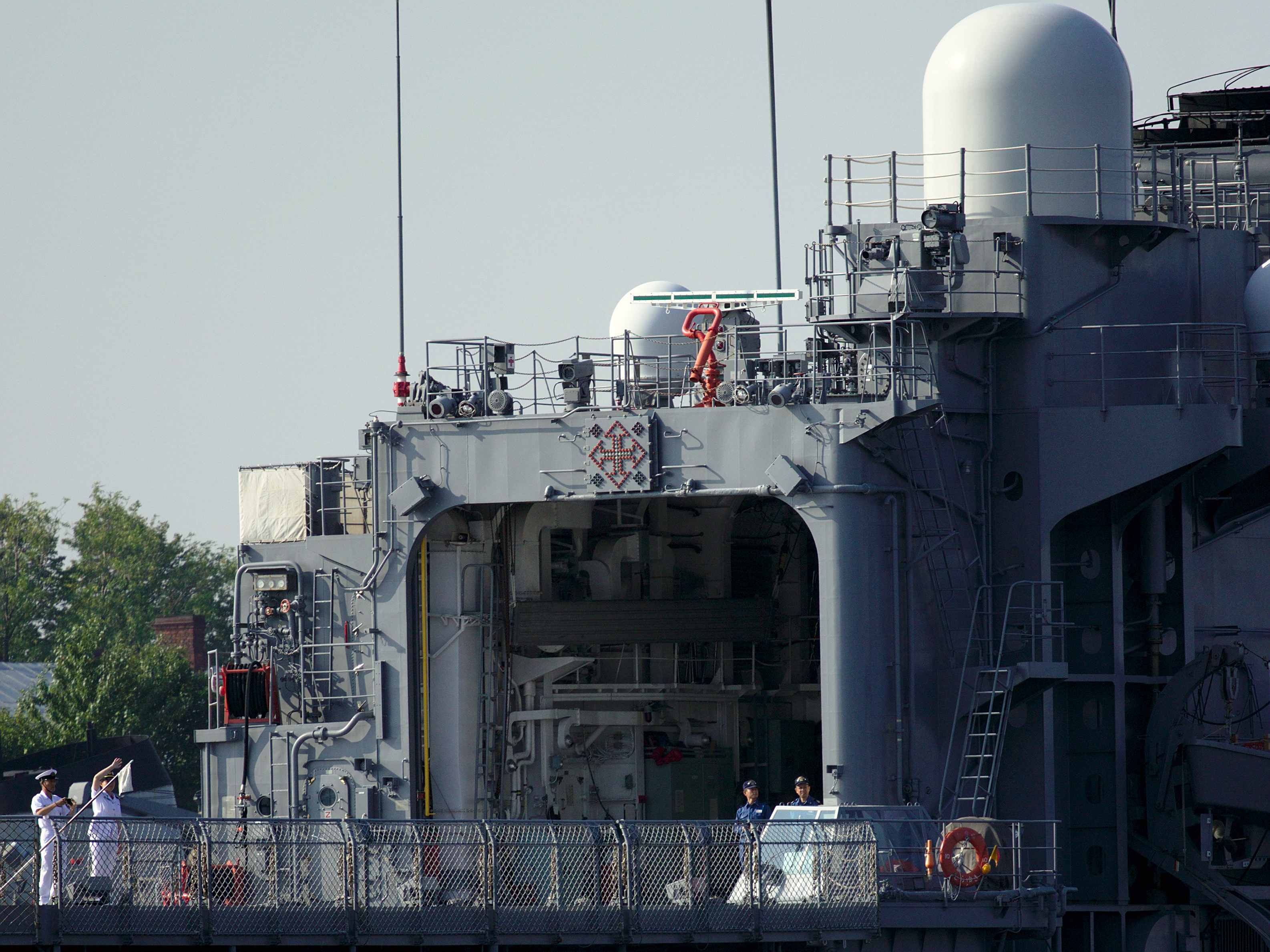 Вертолётный ангар